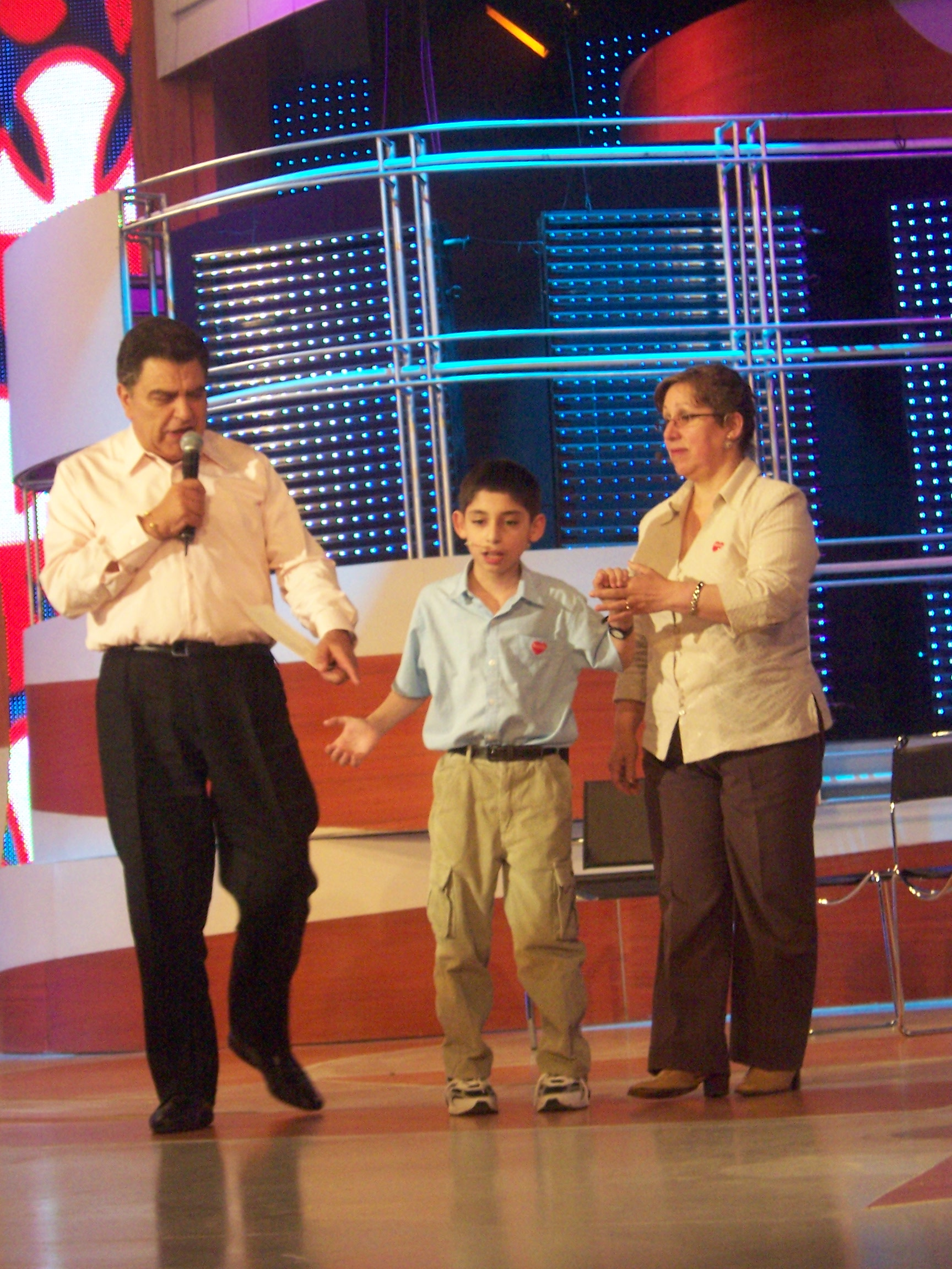 Don Francisco presentando un caso de rehabilitacion infantil durante el Evento Teleton Chile 2007